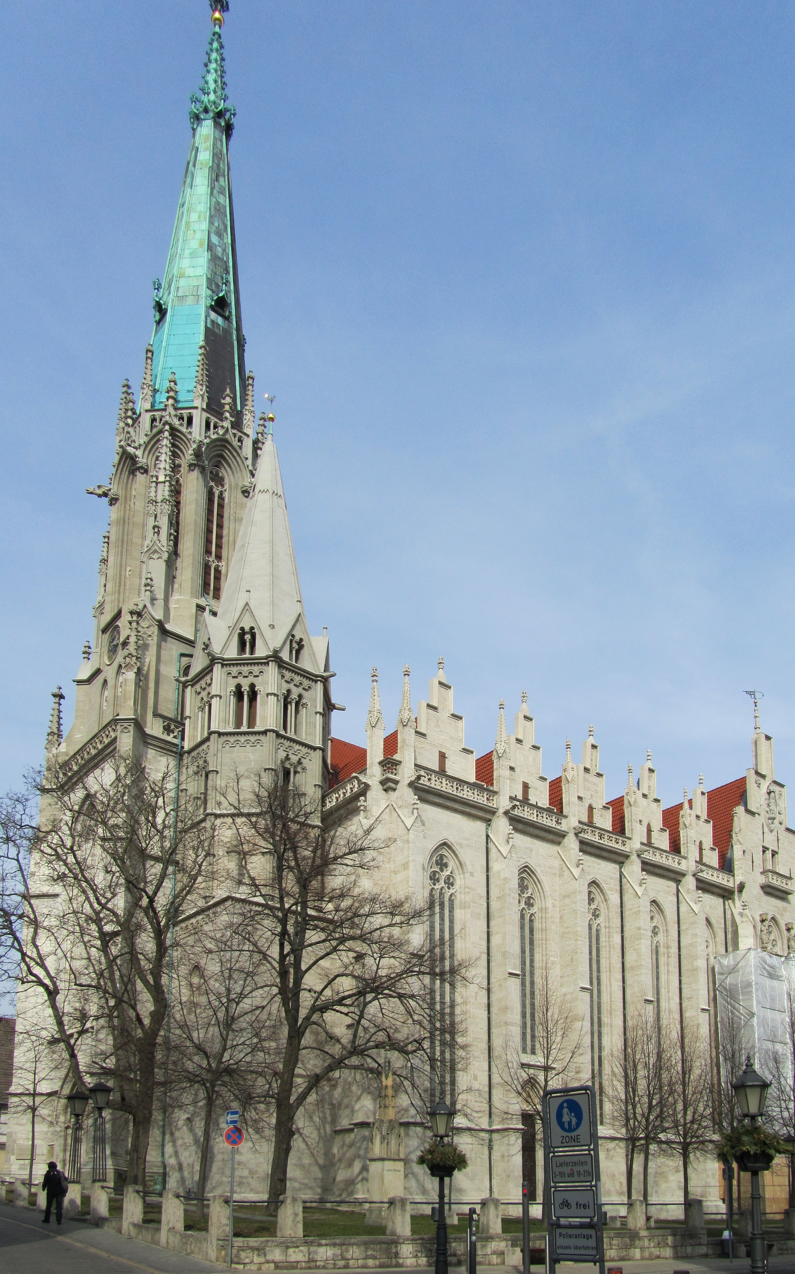 Die Marienkirche in Mühlhausen (Thüringen).